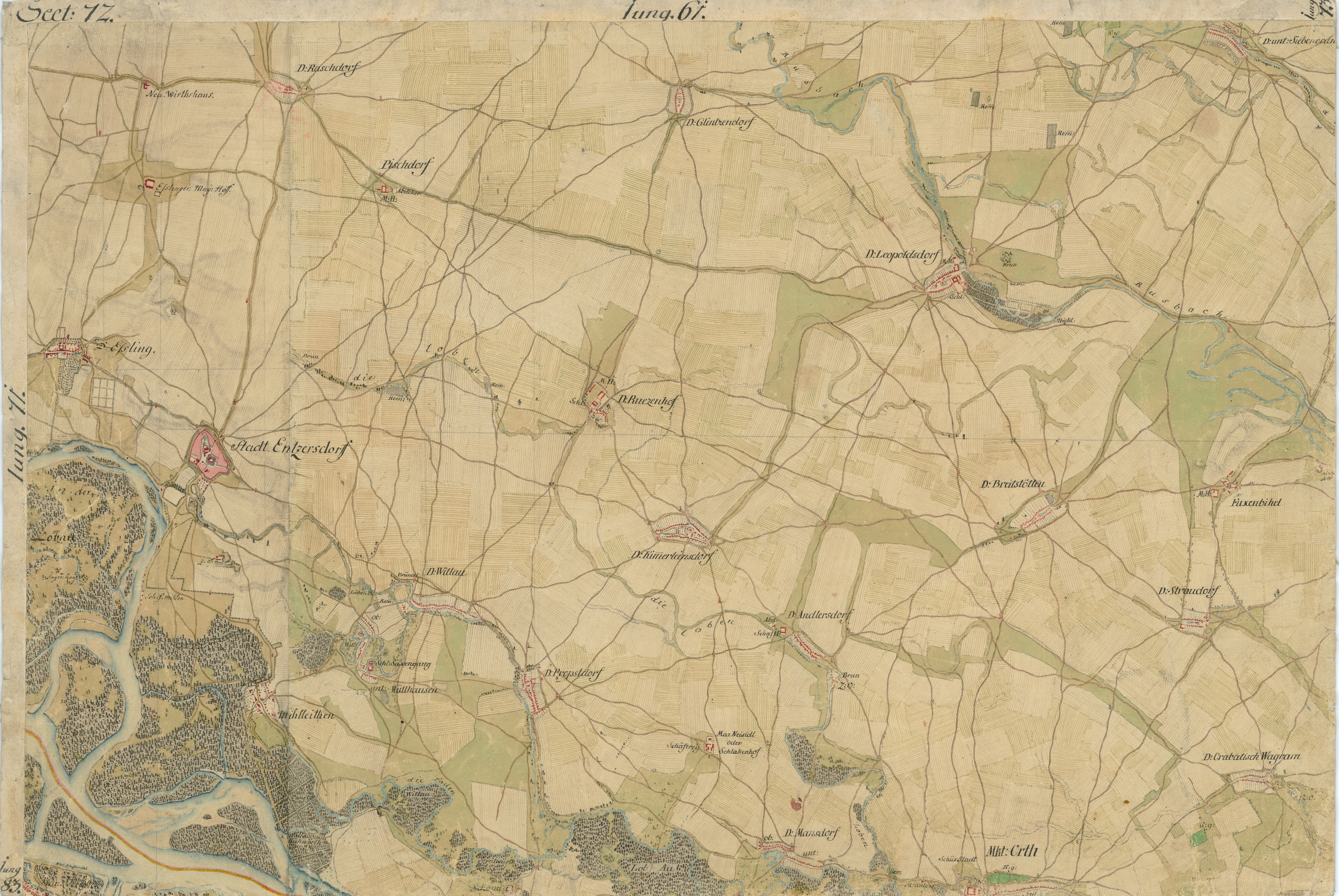 historische Landkarte BIXa242_section 072 Josephinische Landesaufnahme: Gebiet von Groß Enzersdorf, Leopoldsdorf, Crabatisch Wagram, Untersiebenbrunn nordöstlich von Wien, Niederösterreich, Österreich